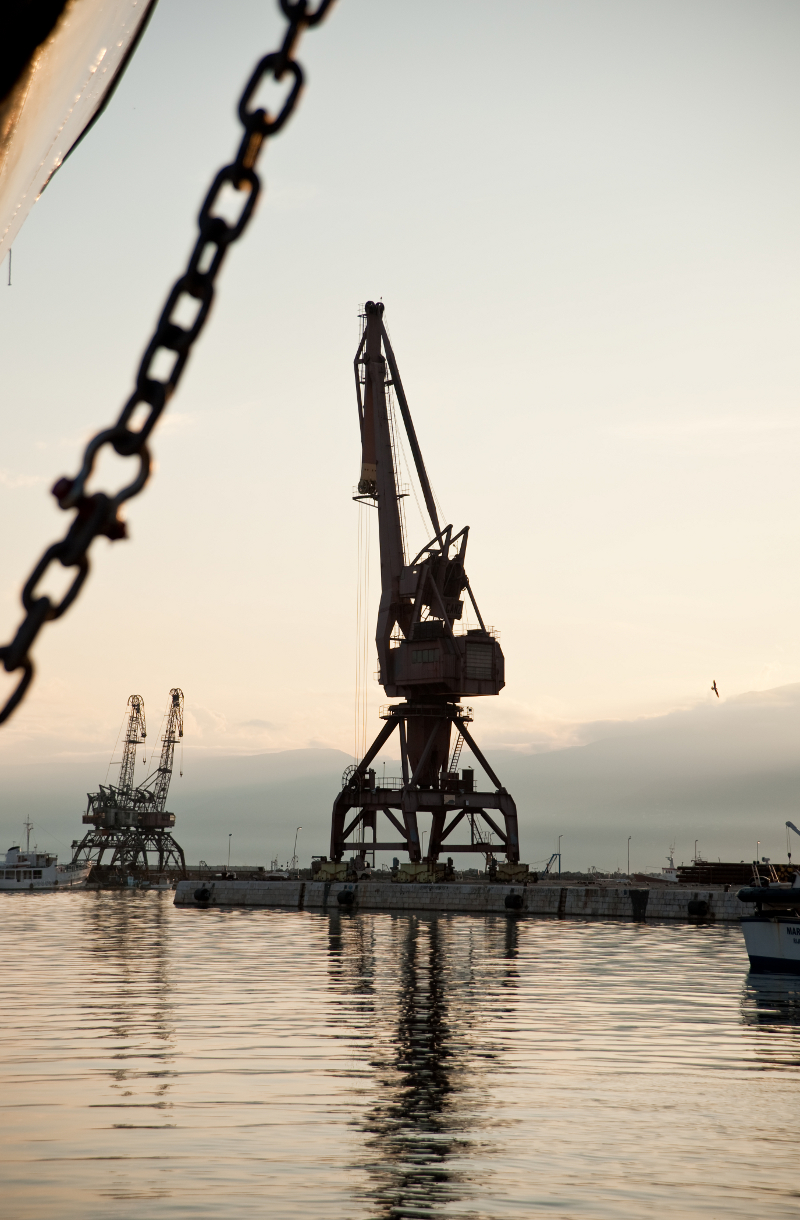 Dizalica u riječkoj luci